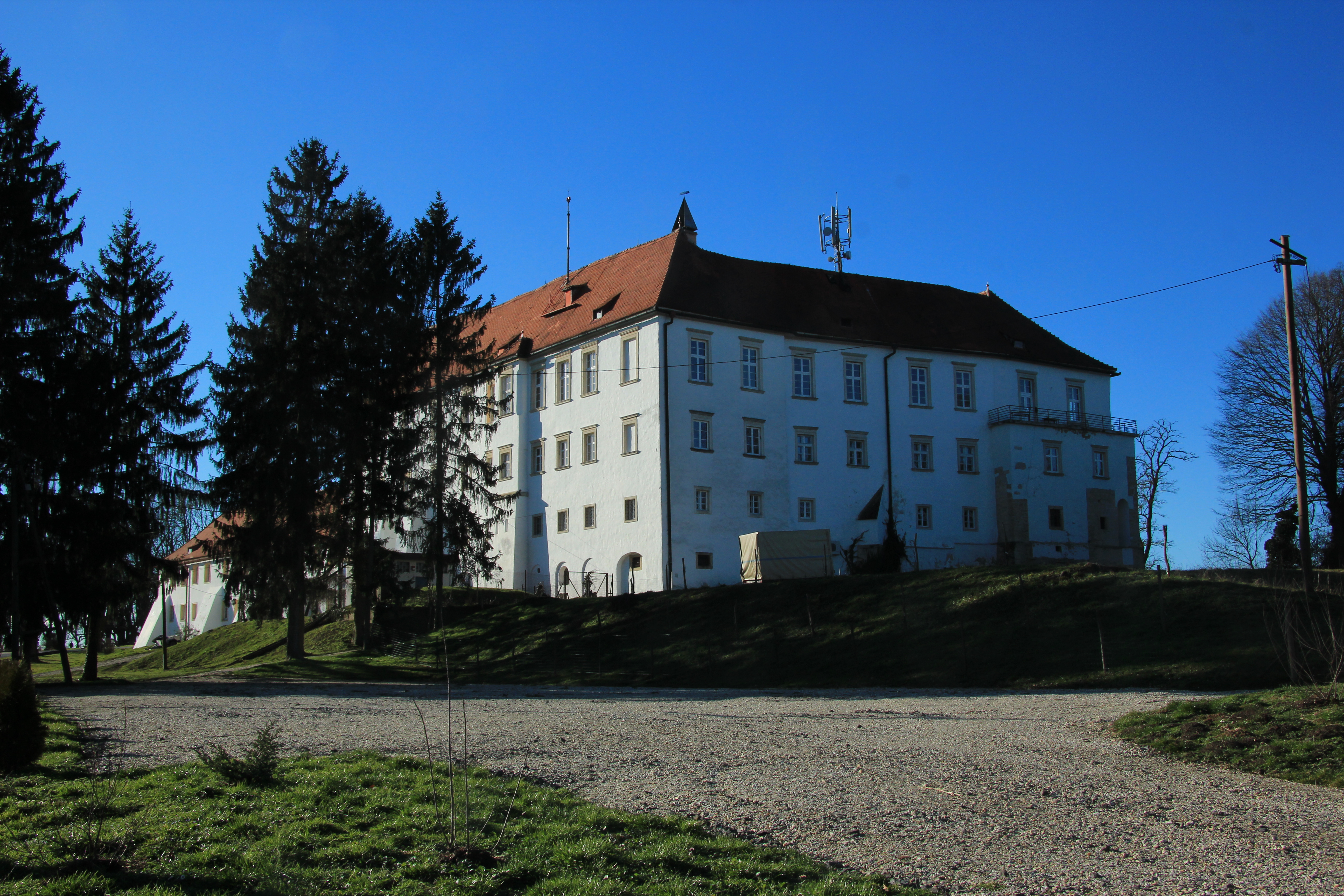 Schloss Gornija Raddgona